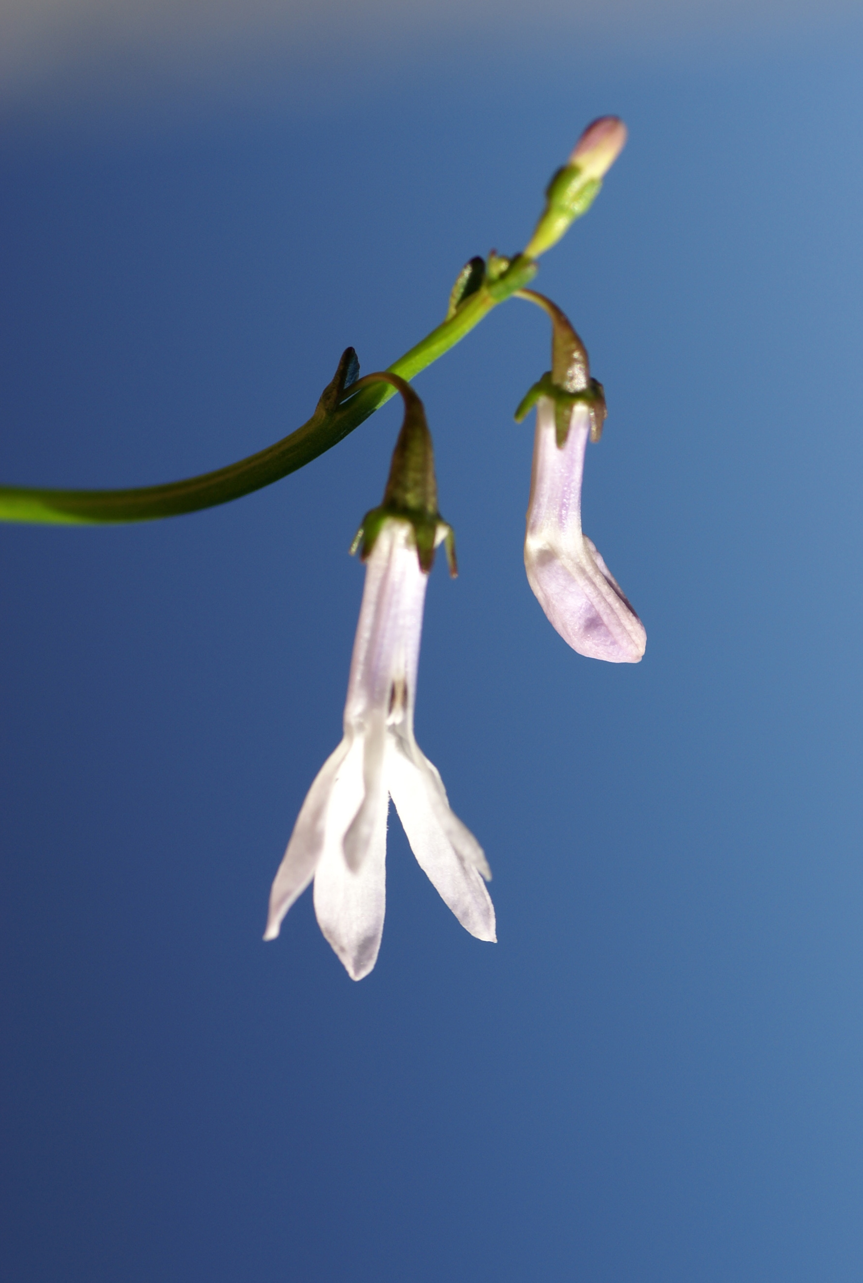 Plant species Lobelia dortmanna